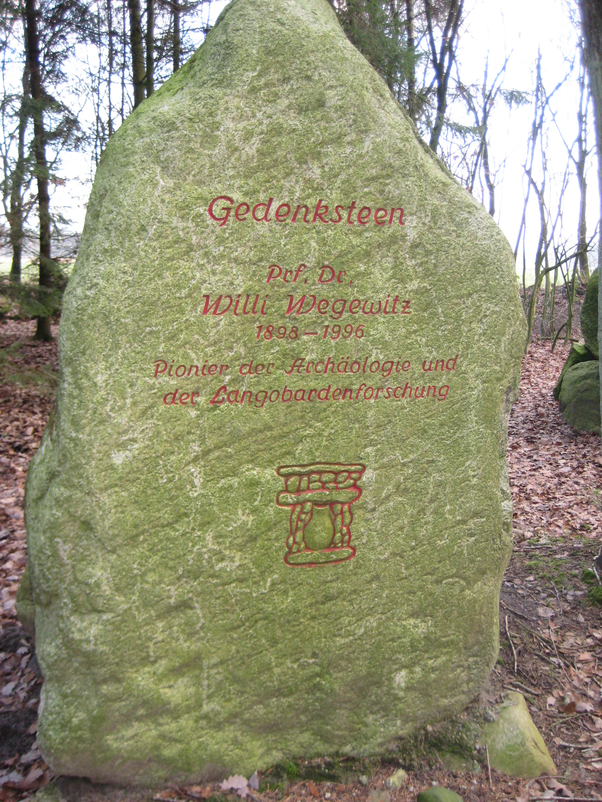 Gedenkstein für Willi Wegewitz in Ottendorf, Ortsteil von Ahlerstedt, Samtgemeinde Harsefeld